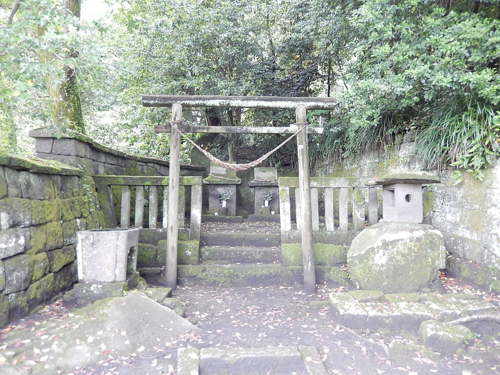 集成館の反射炉跡脇にある山神・水神を祀る神社